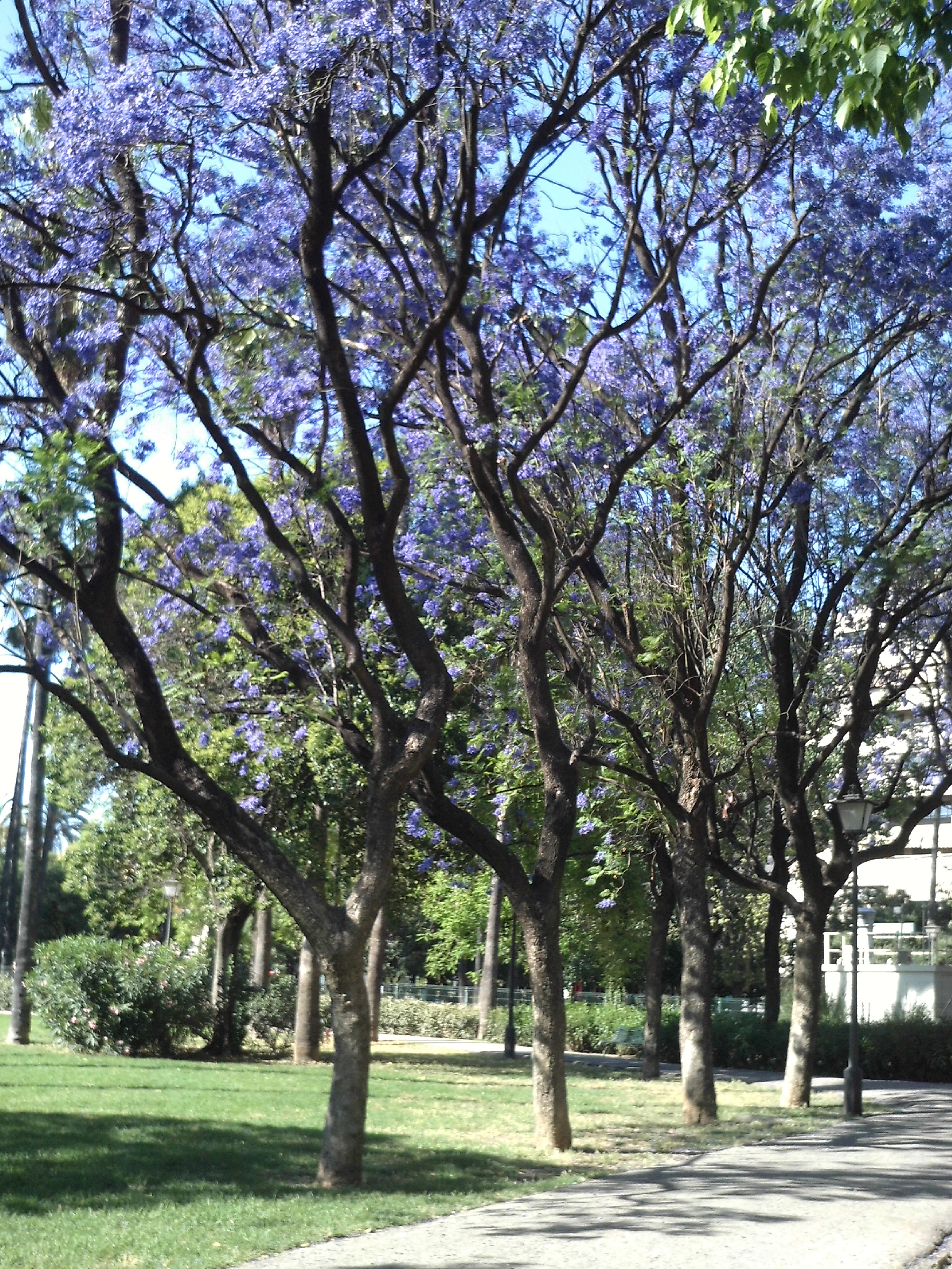 Jacarandas en flor en el Parque de los Príncipes de Triana, en Sevilla